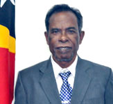 Eduardo de Jesus Barreto, Abgeordneter aus Osttimor